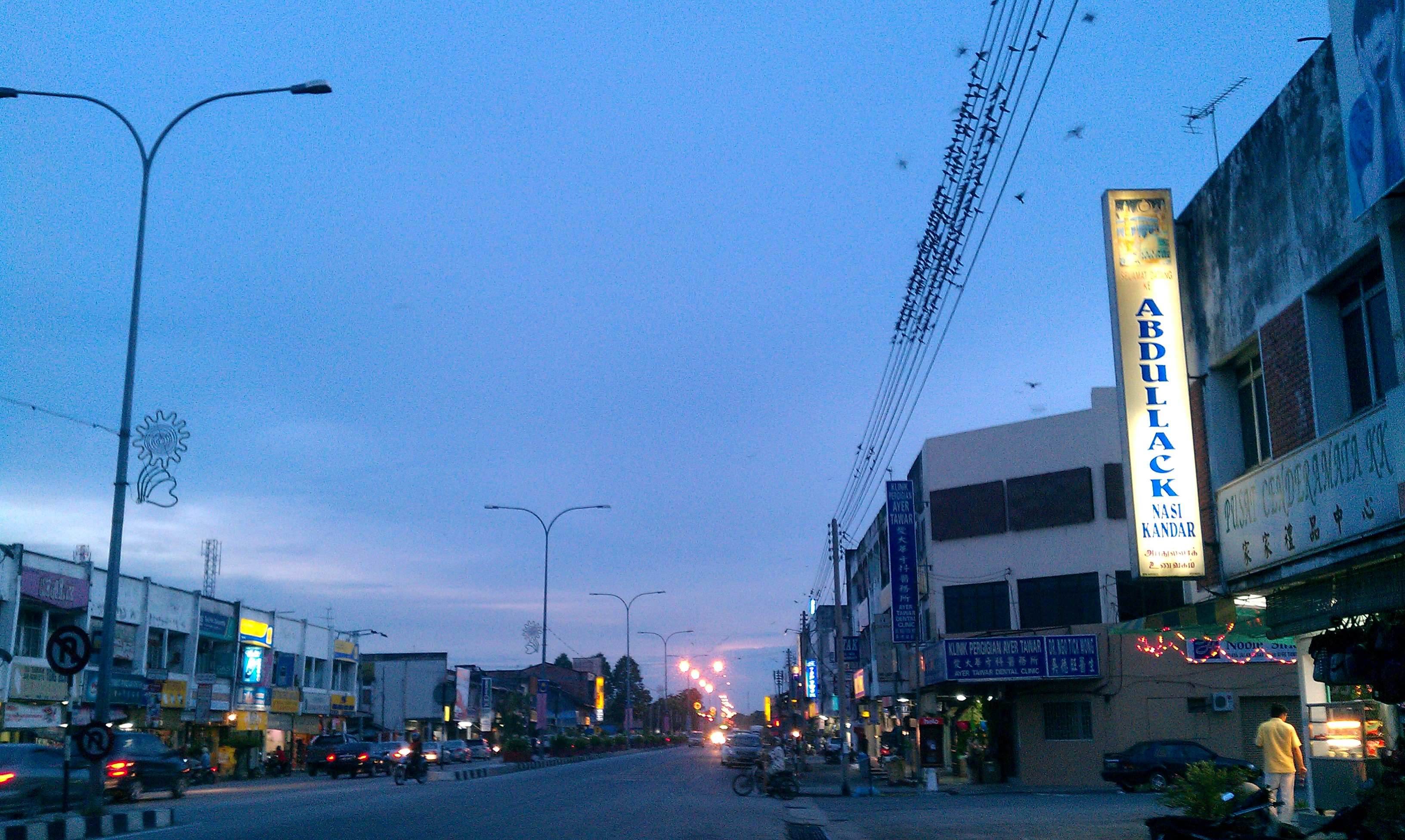 Ayer Tawar Setiawan